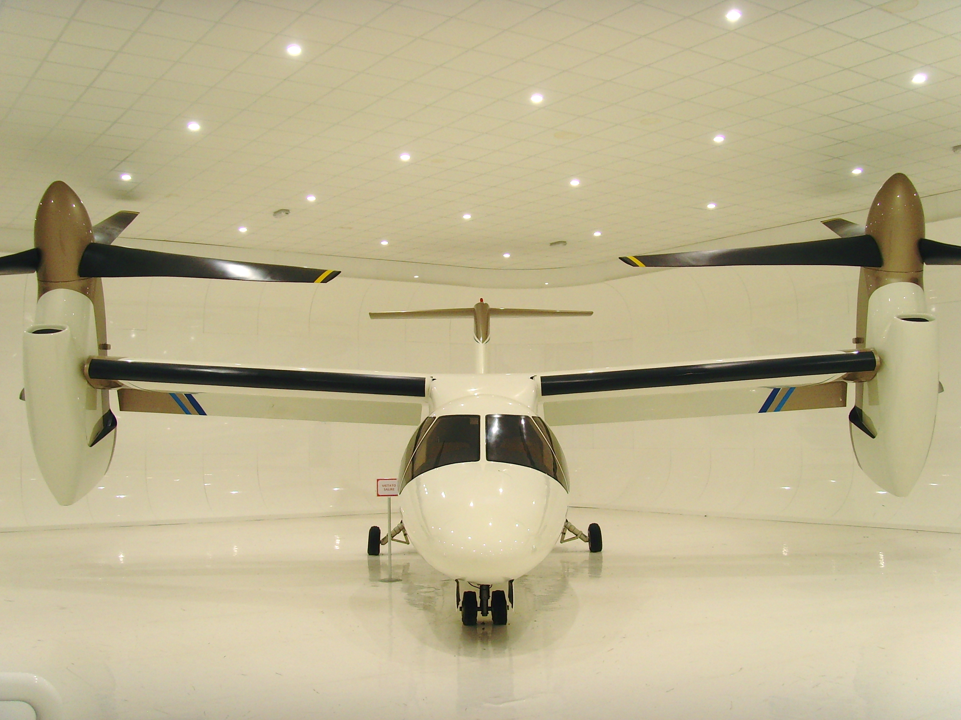 50 Volandia - Bell-Agusta BA609 TiltRotor